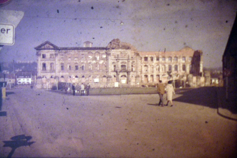 Zweibrücker Schloss (heutiges OLG)